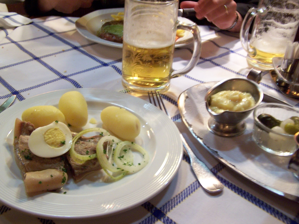 Assiette de tête de veau